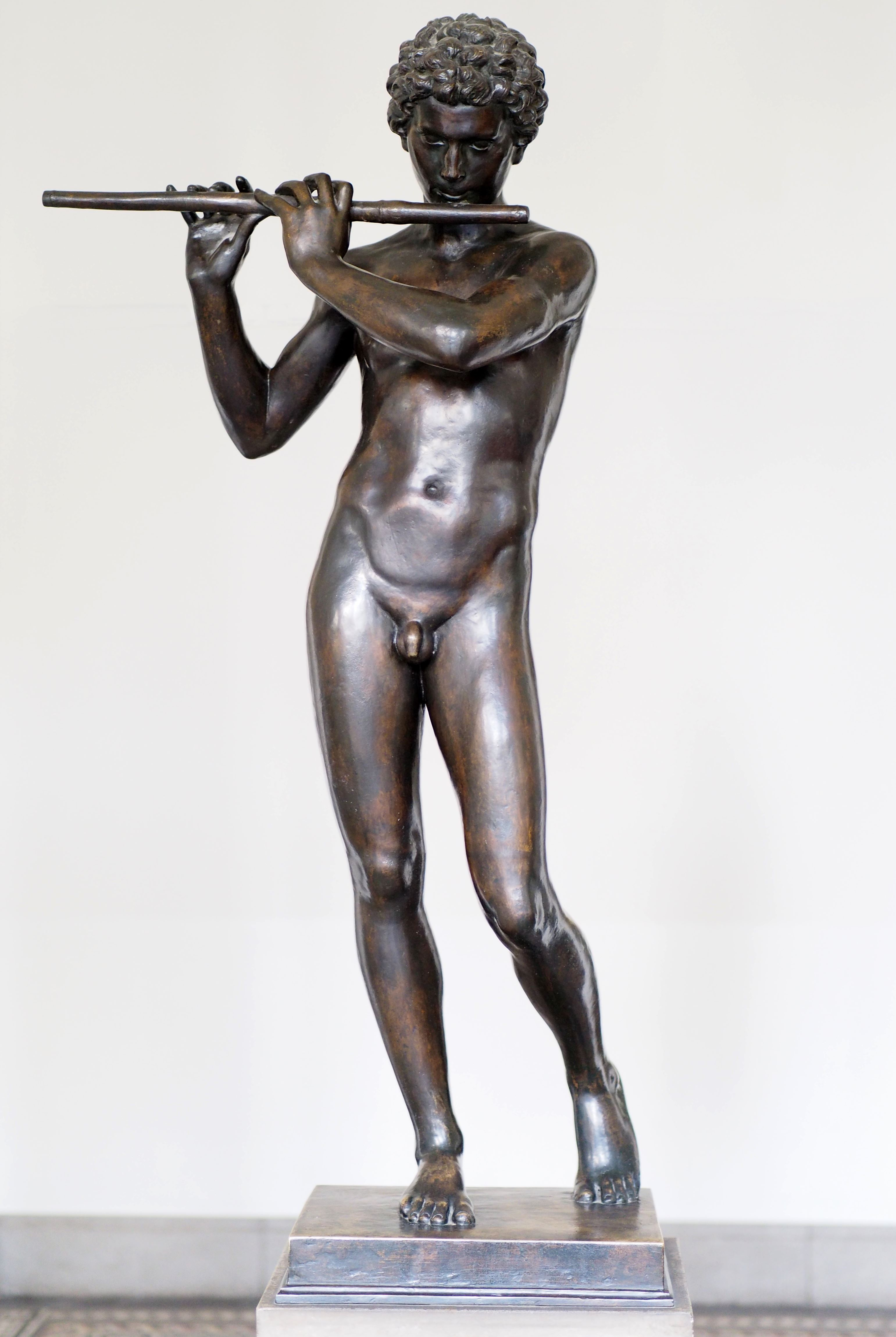 Flötenspieler von Constantin Starck im Foyer des Gebäudes Bundesallee 1 in Berlin.